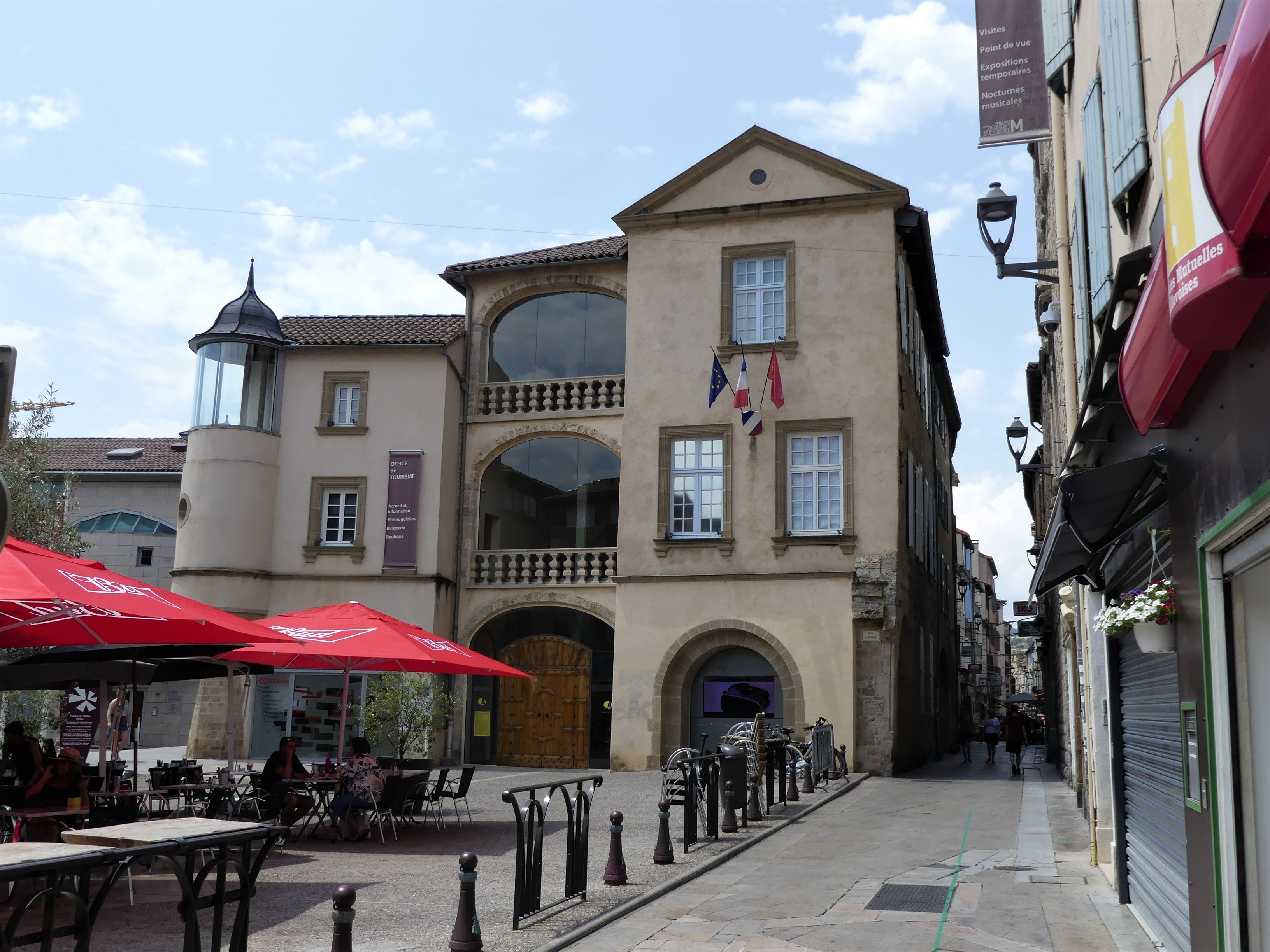 L'office de tourisme de Millau, Aveyron, France.